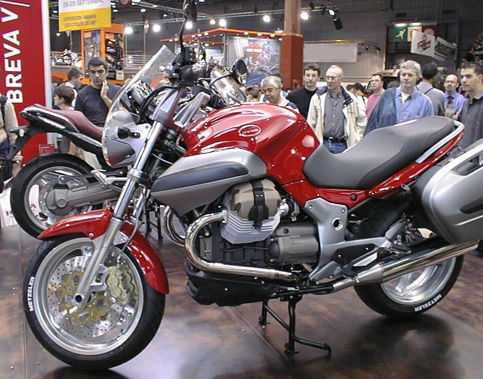 Moto Guzzi Breva 1100 - Mondial du deux roues de Paris, 2003.